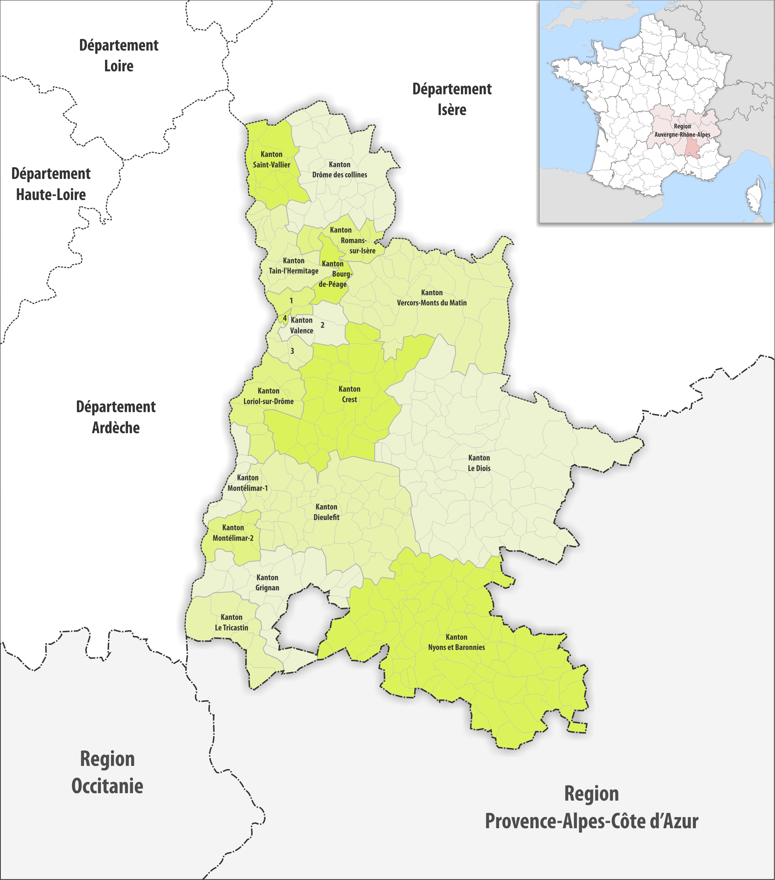 Gemeinden und Kantone im Departement Drôme